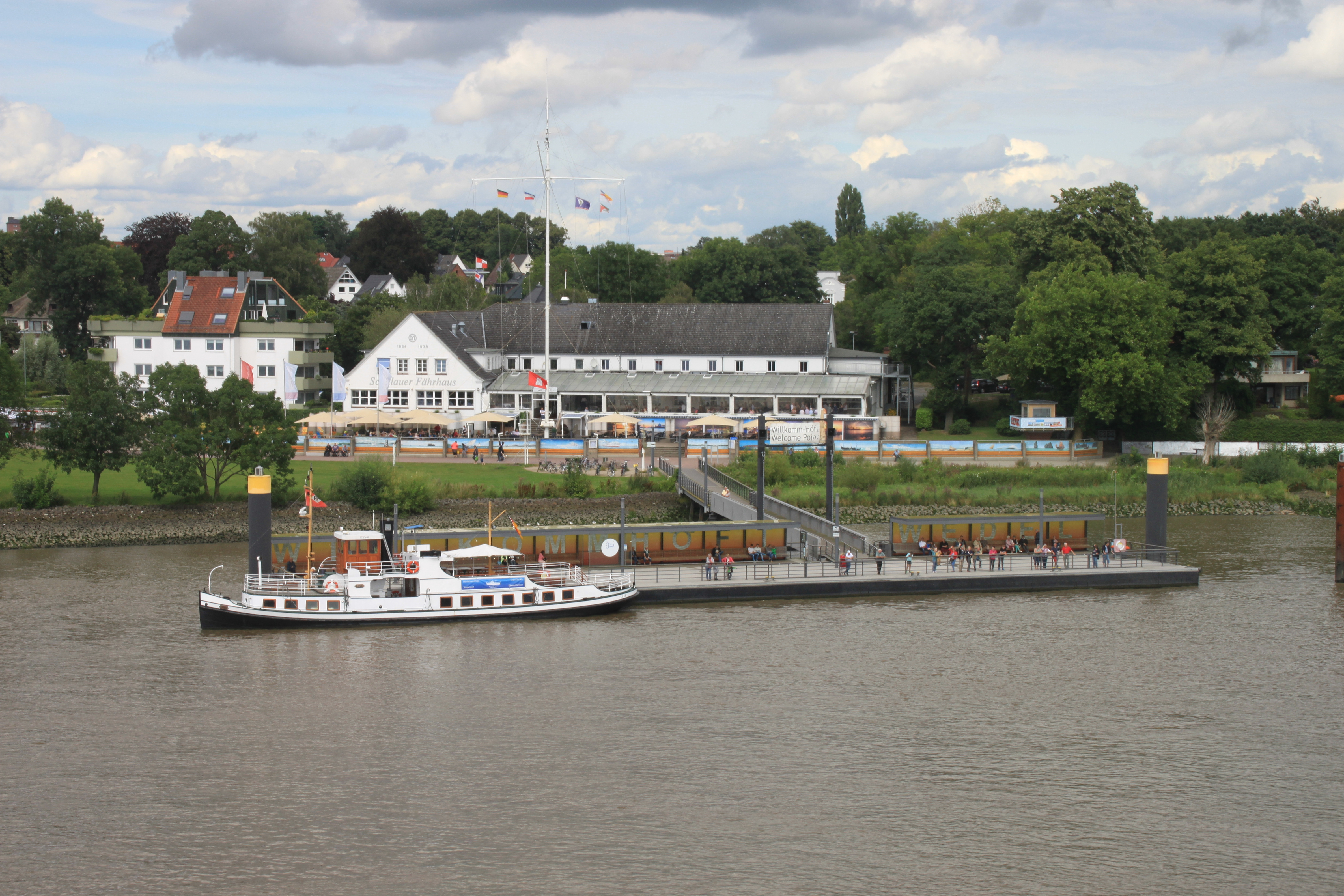 Willkomm-Höft und Schulauer Fährhaus in Wedel_Schiffsbegrüßung, am Anleger: Nostalgieschiff MS LÜHE (Bj. 1927)